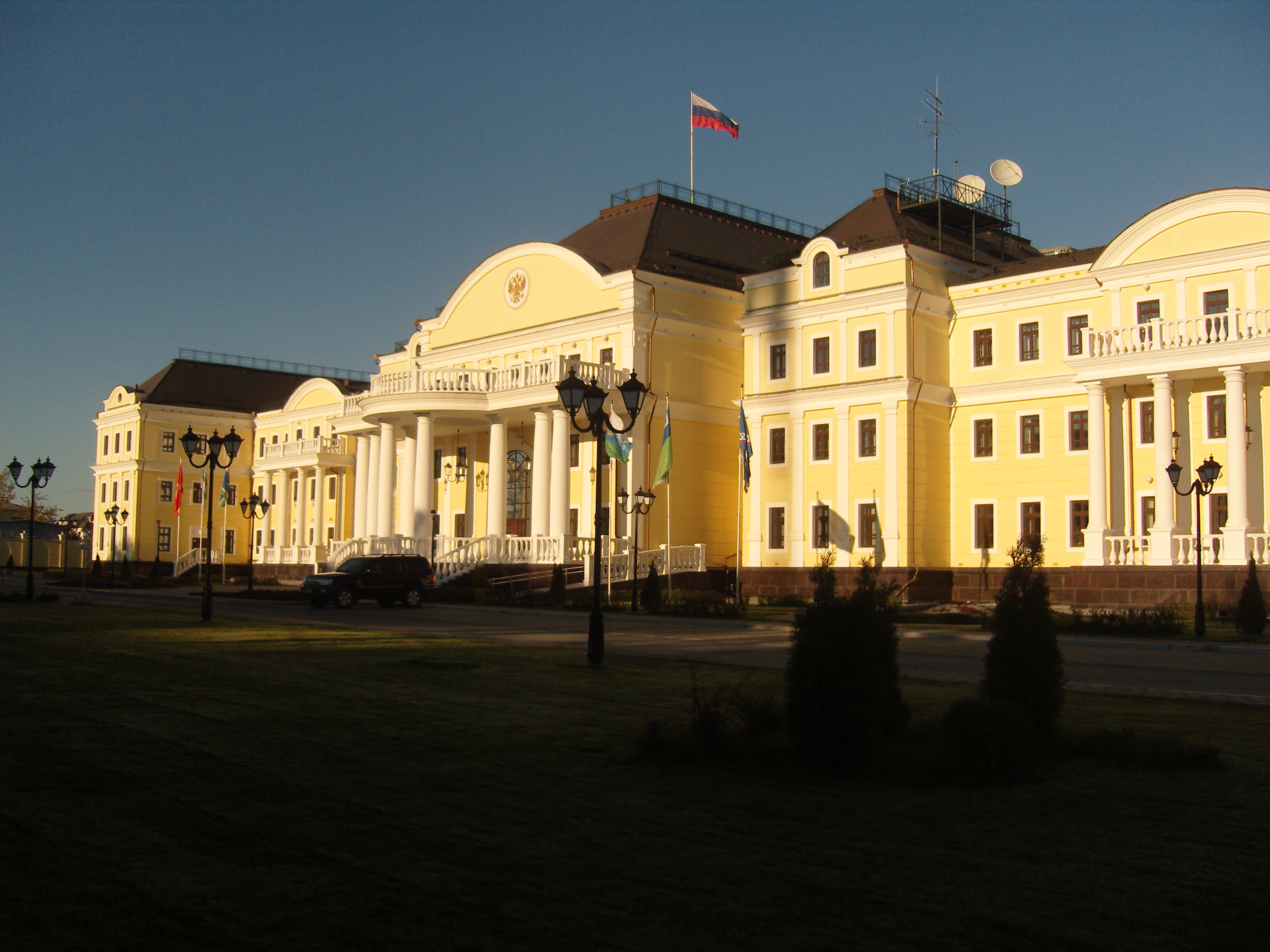 Полпредство УРФО